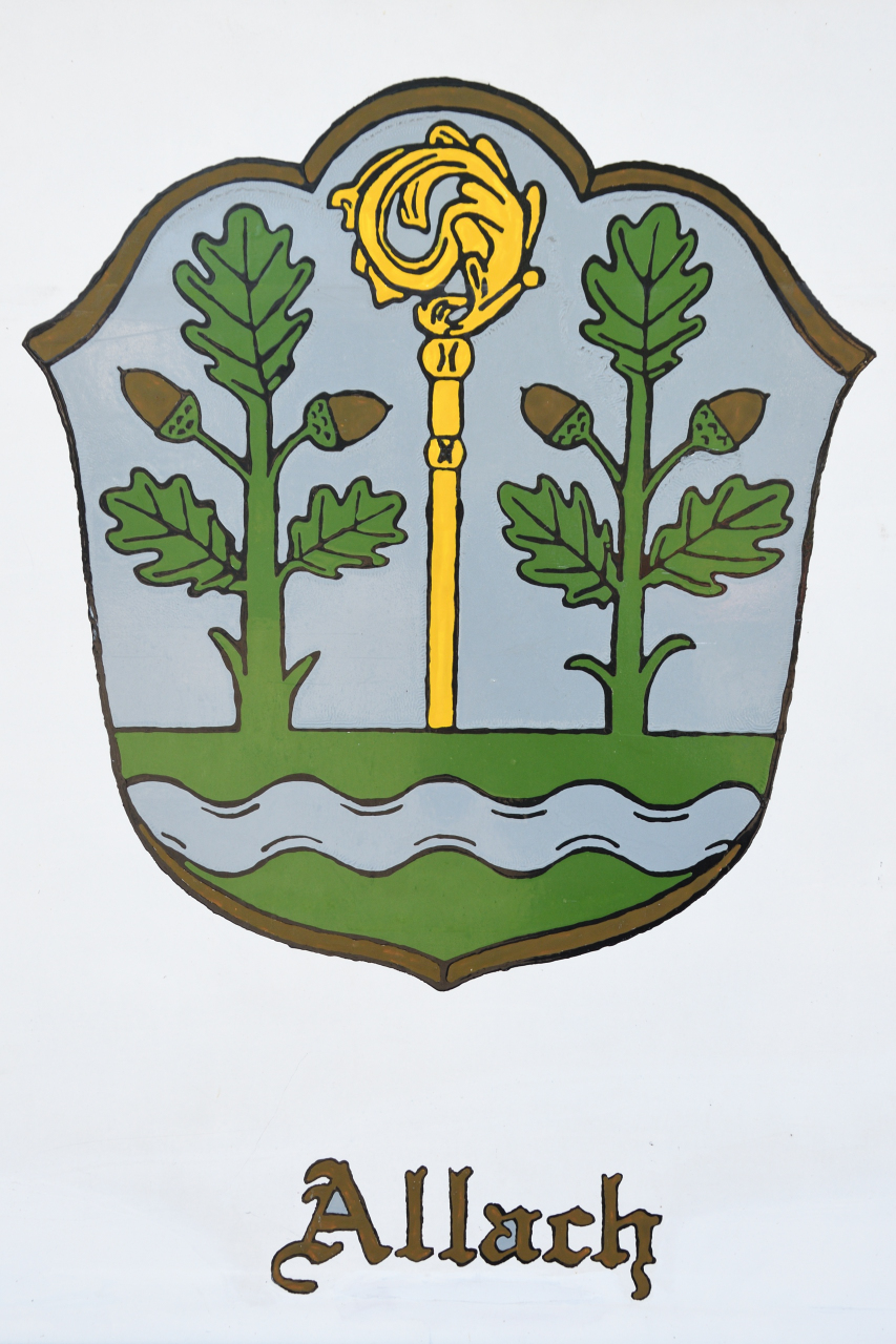 beantragtes Wappen der ehemaligen Gemeinde Allach